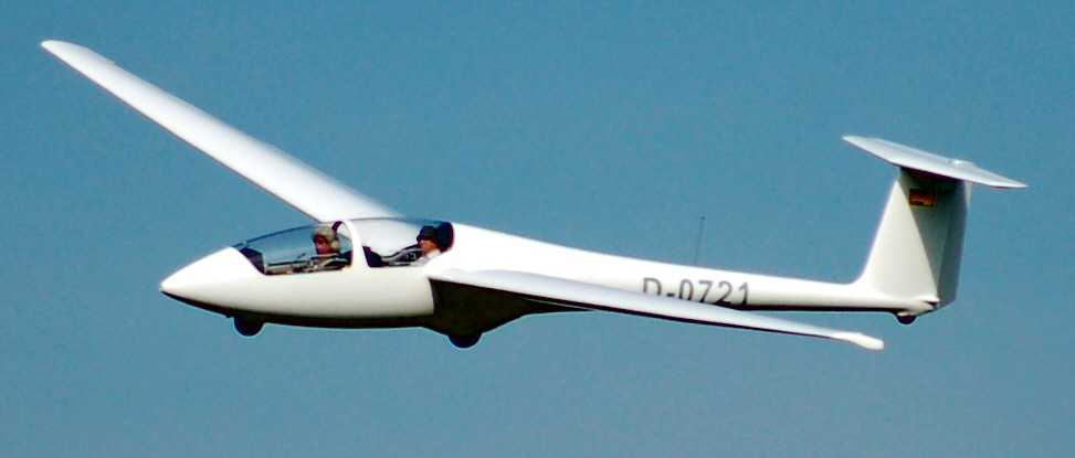 Schleicher ASK 21 (D-0721) über dem Flugplatz Uetersen